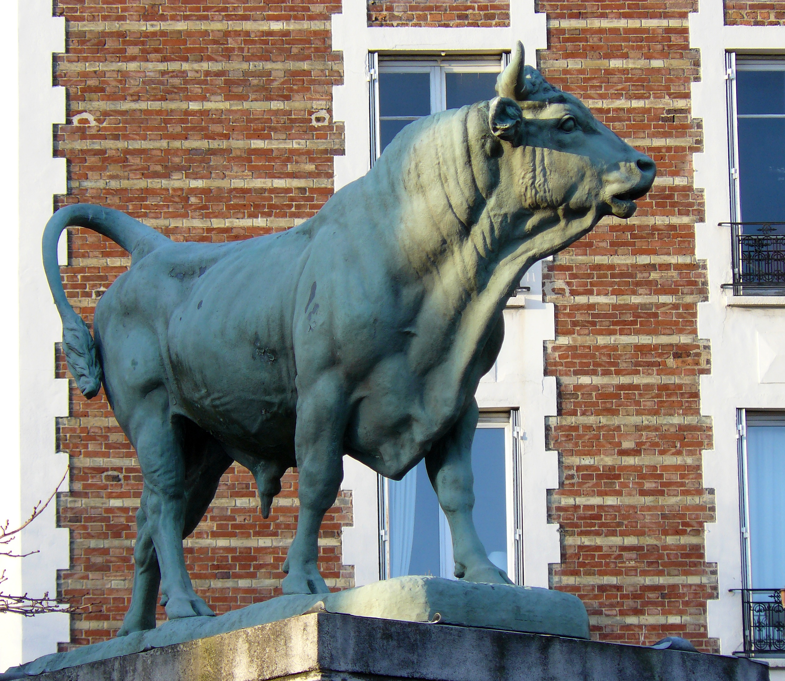 Taureau, fonte de fer grandeur nature d'Isidore Bonheur (1827-1901) - Deux statues identiques sont erigées au sommet de piliers à l'entrée du parc Georges Brassens (15ème arrondissement de Paris). Originellement elles se trouvaient dans les jardins du Trocadéro (source : [1]) - Fonte de fer des fonderies du Val d'Osne.